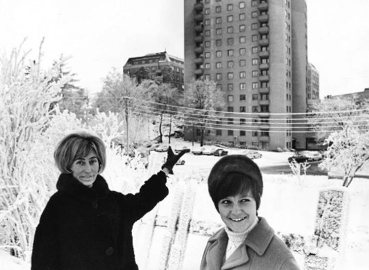 Britt Lindeborg, Anna-Lena Löfgren (680109). De pekar mot området Hagalund där inspirationen till Lindeborgs text om "Lyckliga gatan" hämtades.